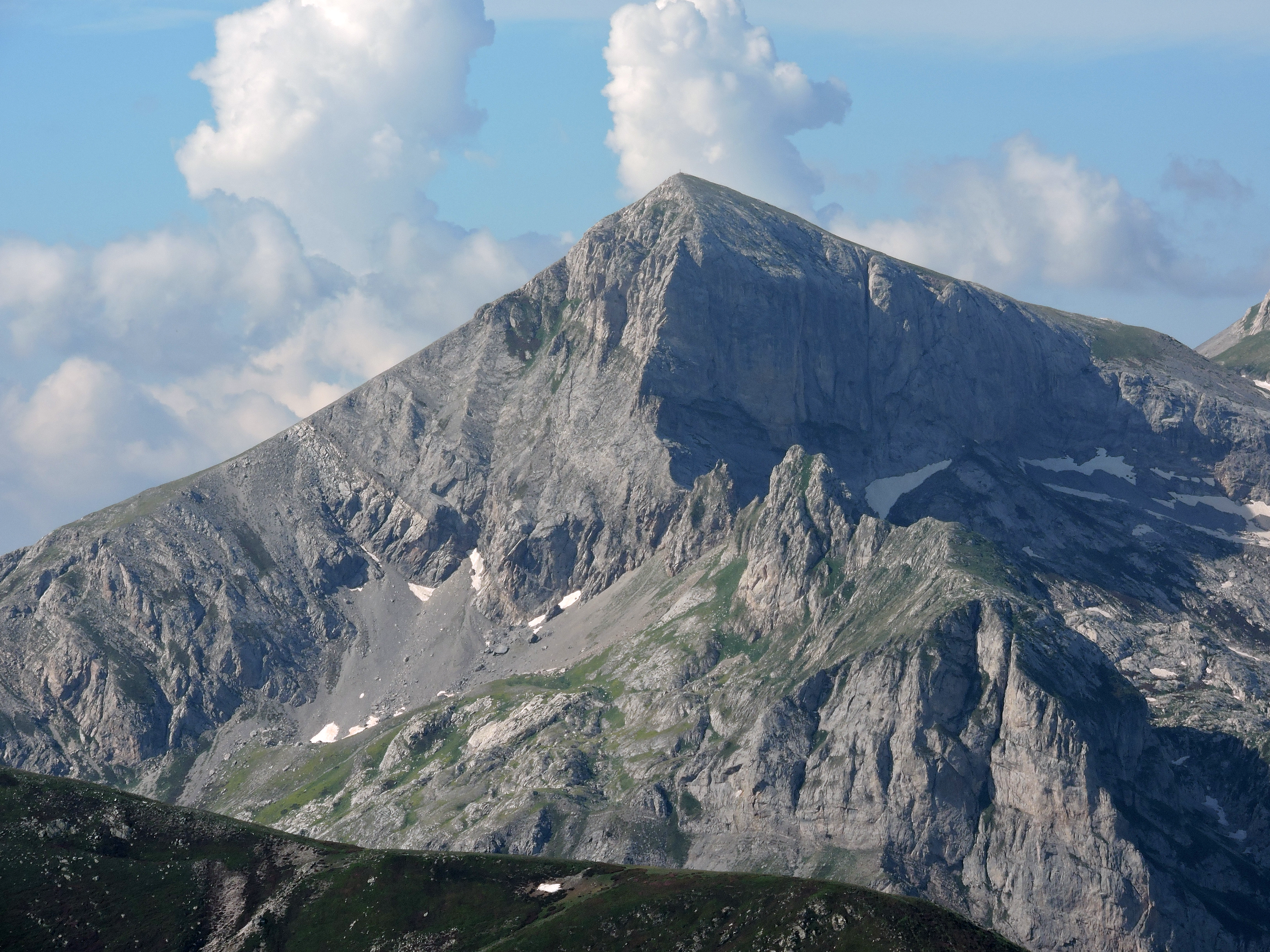 La cima delle Saline vista dal Mondolè (Alpi Liguri)